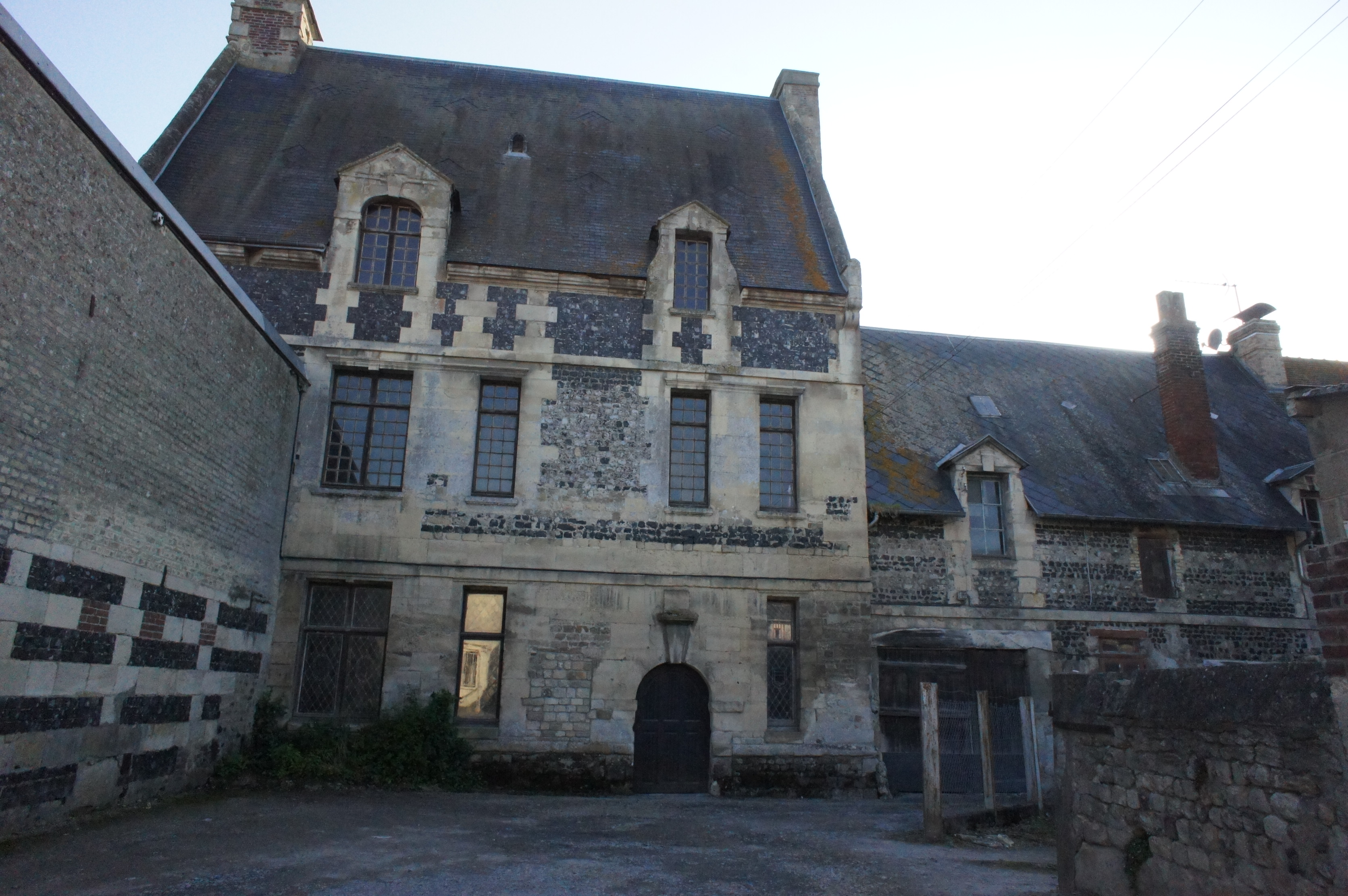 Touques